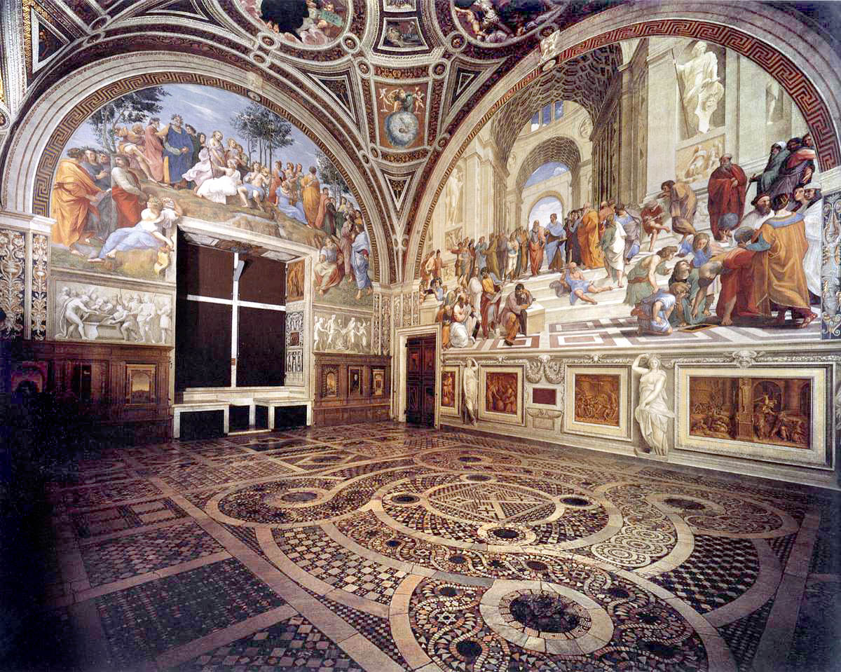 Pohľad do Stanza della Segnatura v Apoštolskom paláci vo Vatikáne